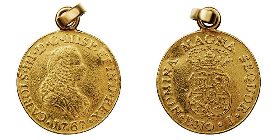 Moneda de dos escuts encunyada en 1767 al regnat de Carles III d'Espanya. És una peça d'or fabricada a Popayán (Colòmbia).